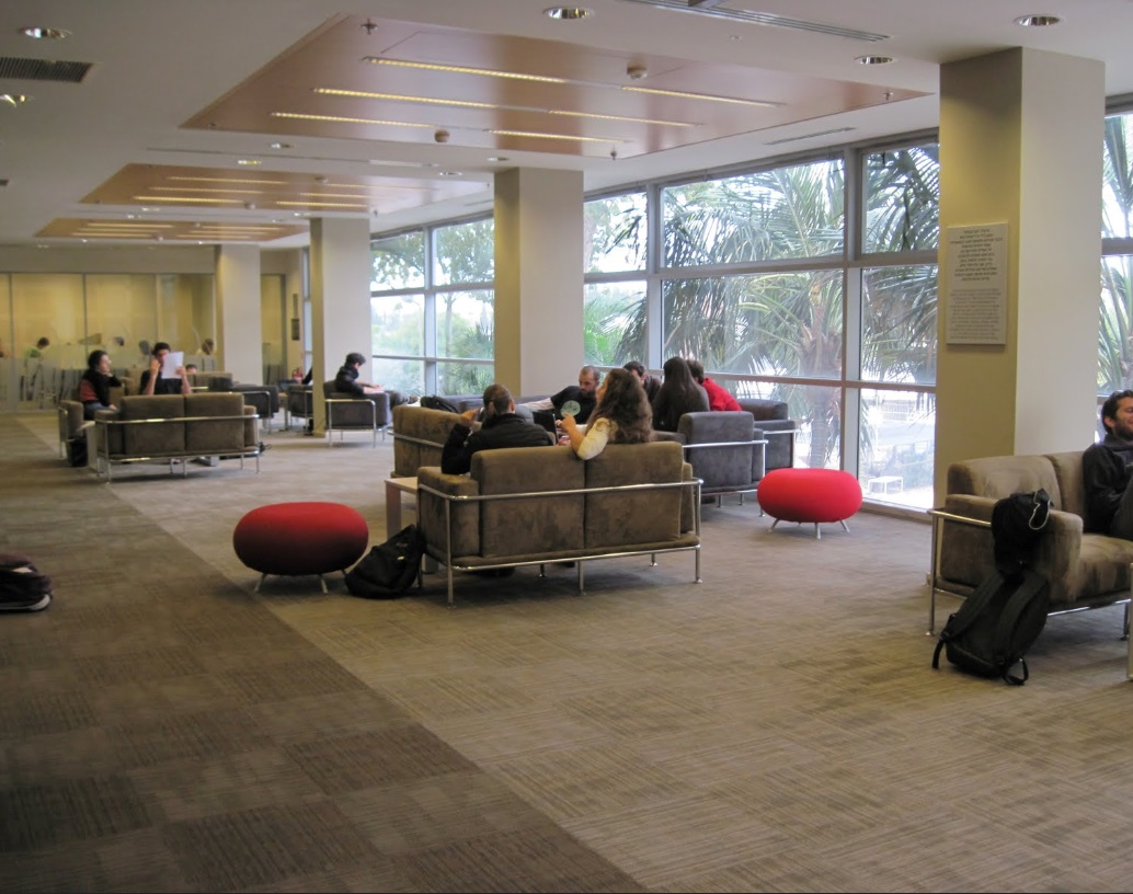 ספרייה, אזור הספות